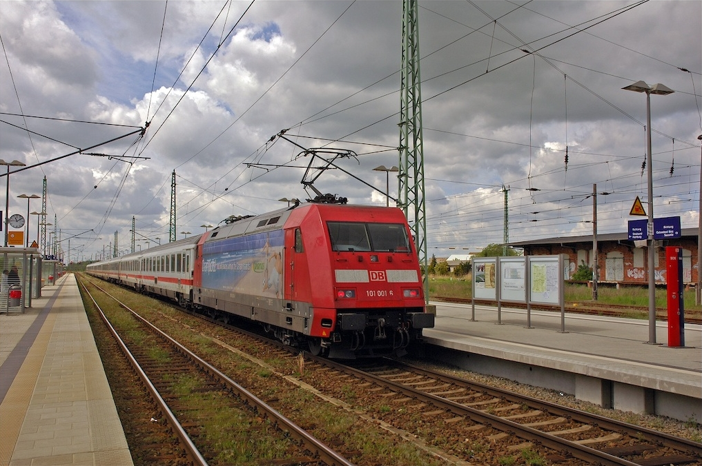 BR 101 mit IC 2213 nach Stuttgart im Bahnhof Bergen auf Rügen